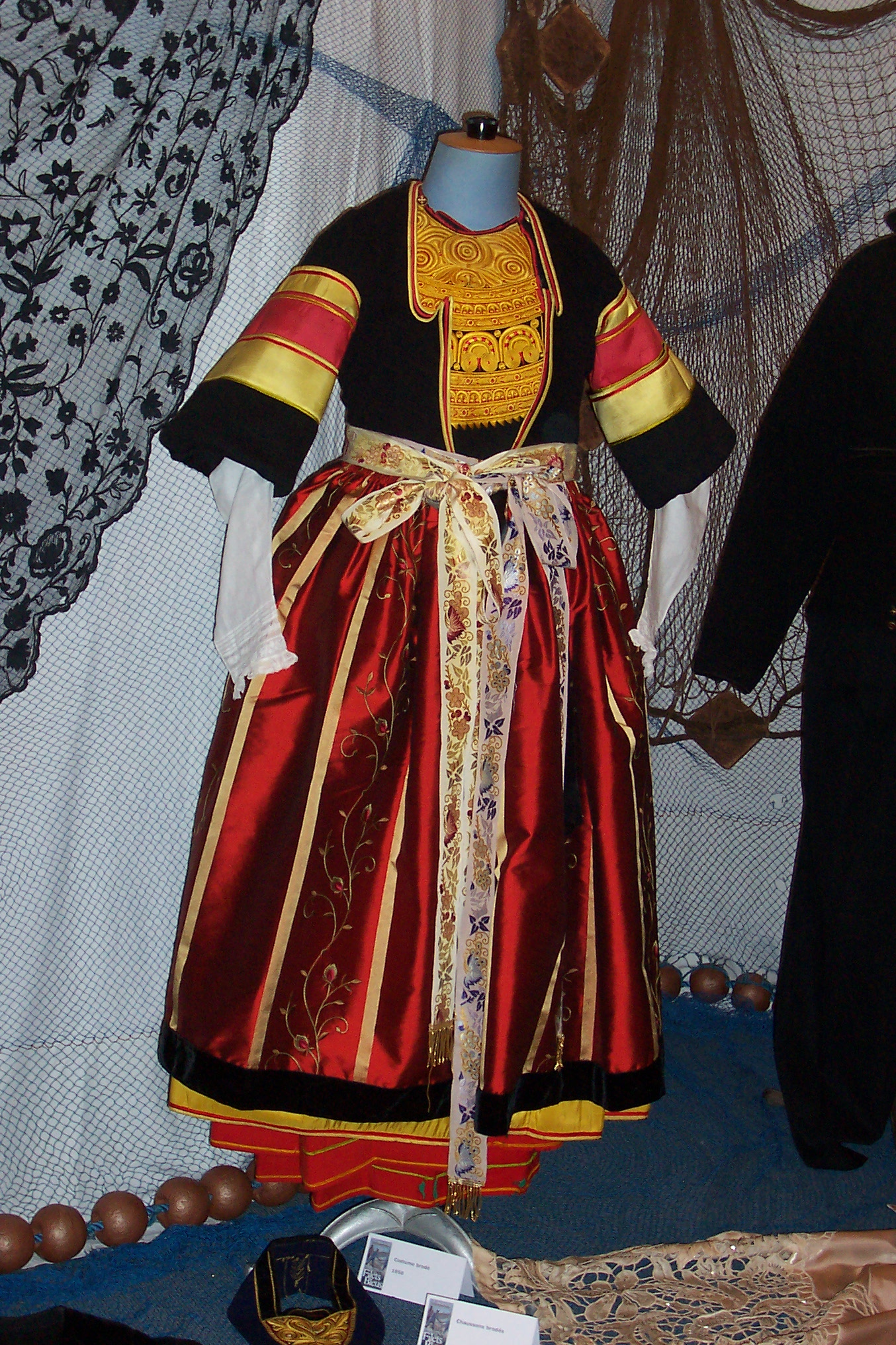 Pour identification